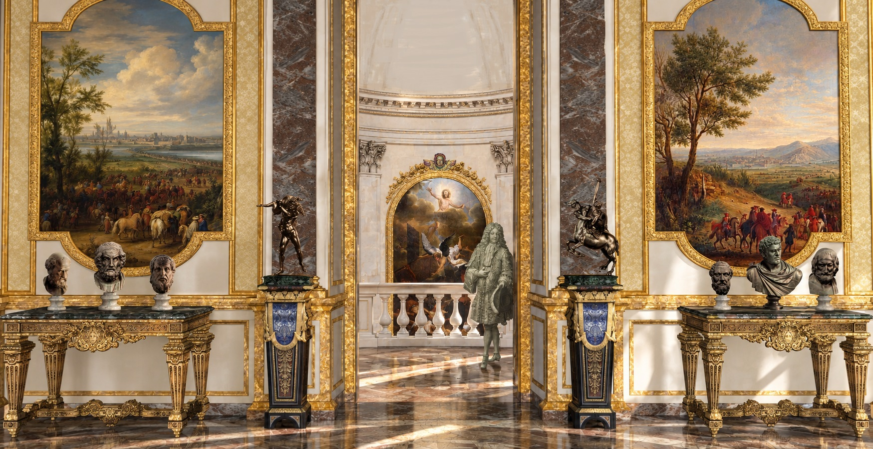 Essai de restitution de la vue sur la chapelle depuis le milieu de la galerie, vers 1710.